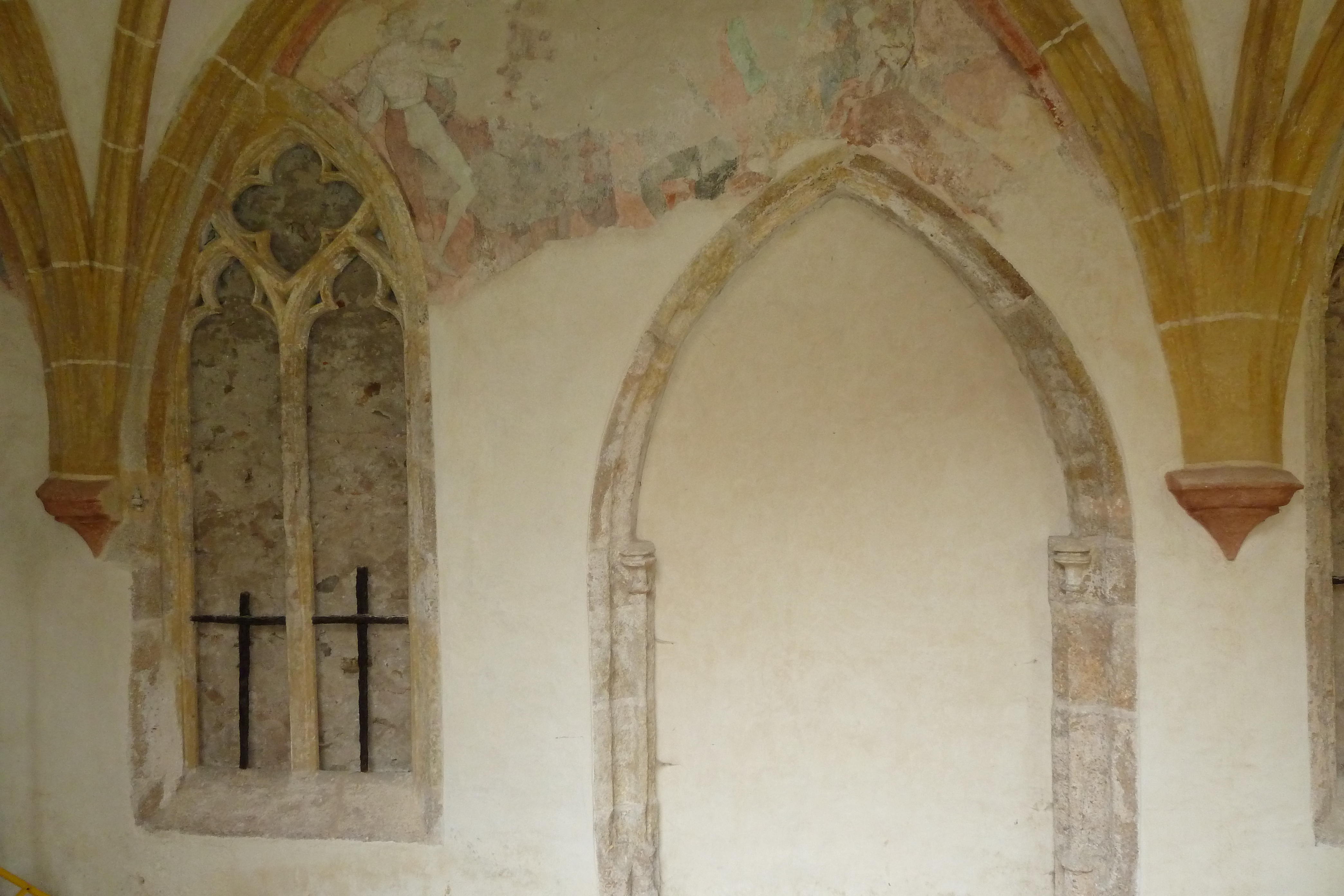 Zbytky původního portálu a okna ve zdi ambitu.